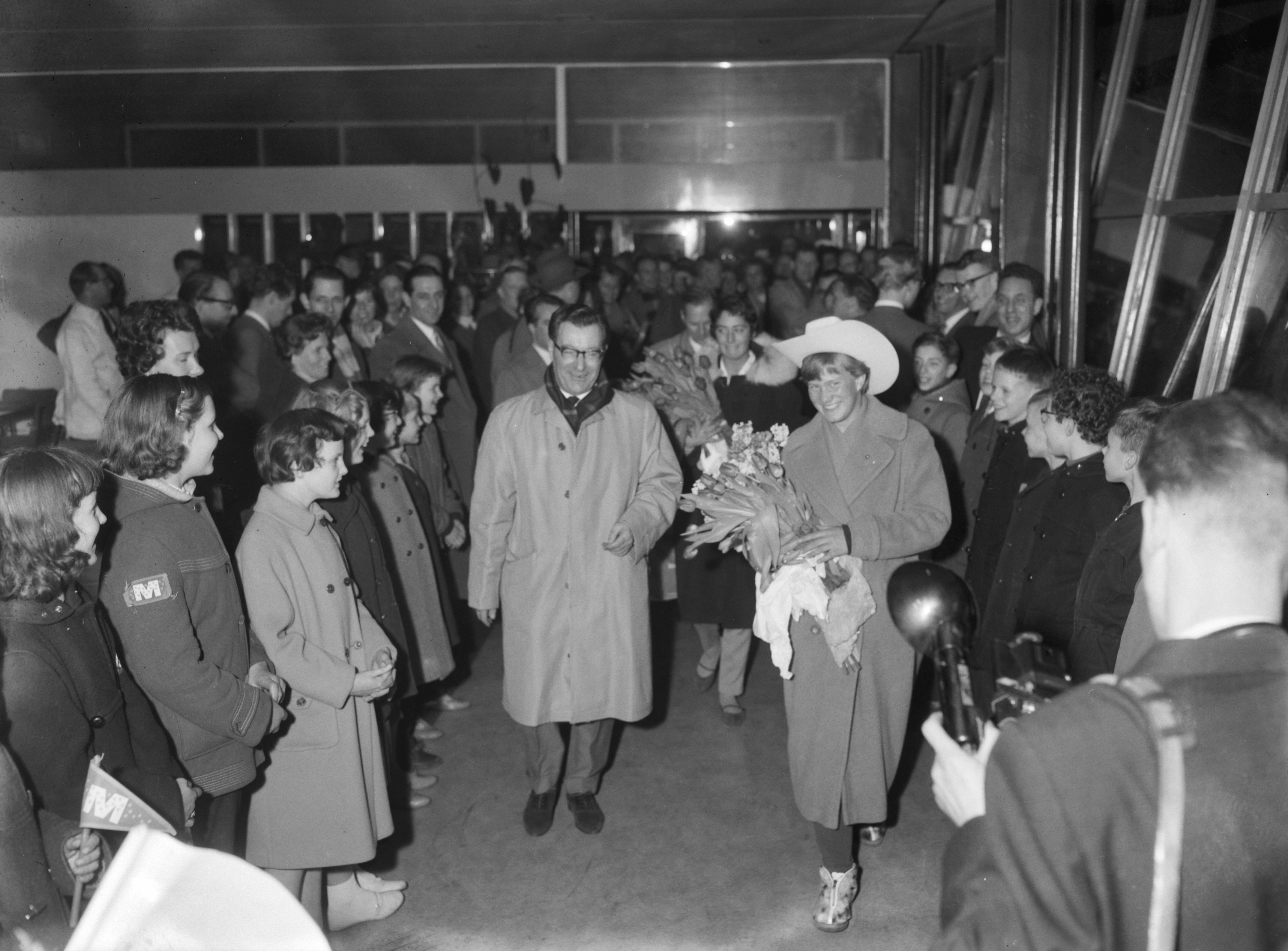 Collectie / Archief : Fotocollectie Anefo Reportage / Serie : [ onbekend ] Beschrijving : Aankomst van Sjoukje Dijkstra en Joan Haanappel op Schiphol uit Amerika, aankomst door erehaag van melkbrigadiers Datum : 4 maart 1959 Locatie : Amsterdam, Noord-Holland Trefwoorden : kunstrijden, melkbrigadiers, schaatsen Persoonsnaam : Dijkstra, Sjoukje, Haanappel, Joan Fotograaf : Rossem, Wim van / Anefo Auteursrechthebbende : Nationaal Archief Materiaalsoort : Negatief (zwart/wit) Nummer archiefinventaris : bekijk toegang 2.24.01.04 Bestanddeelnummer : 910-1925